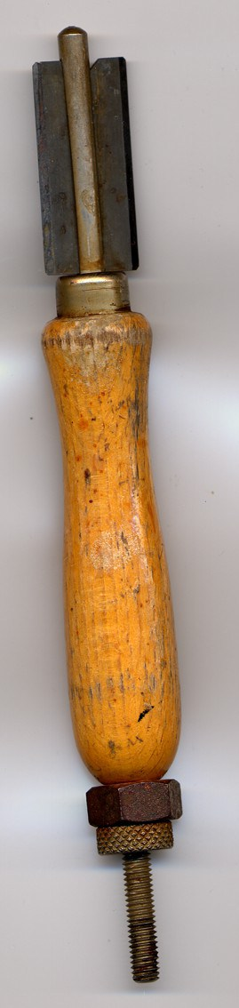 Glasschneider